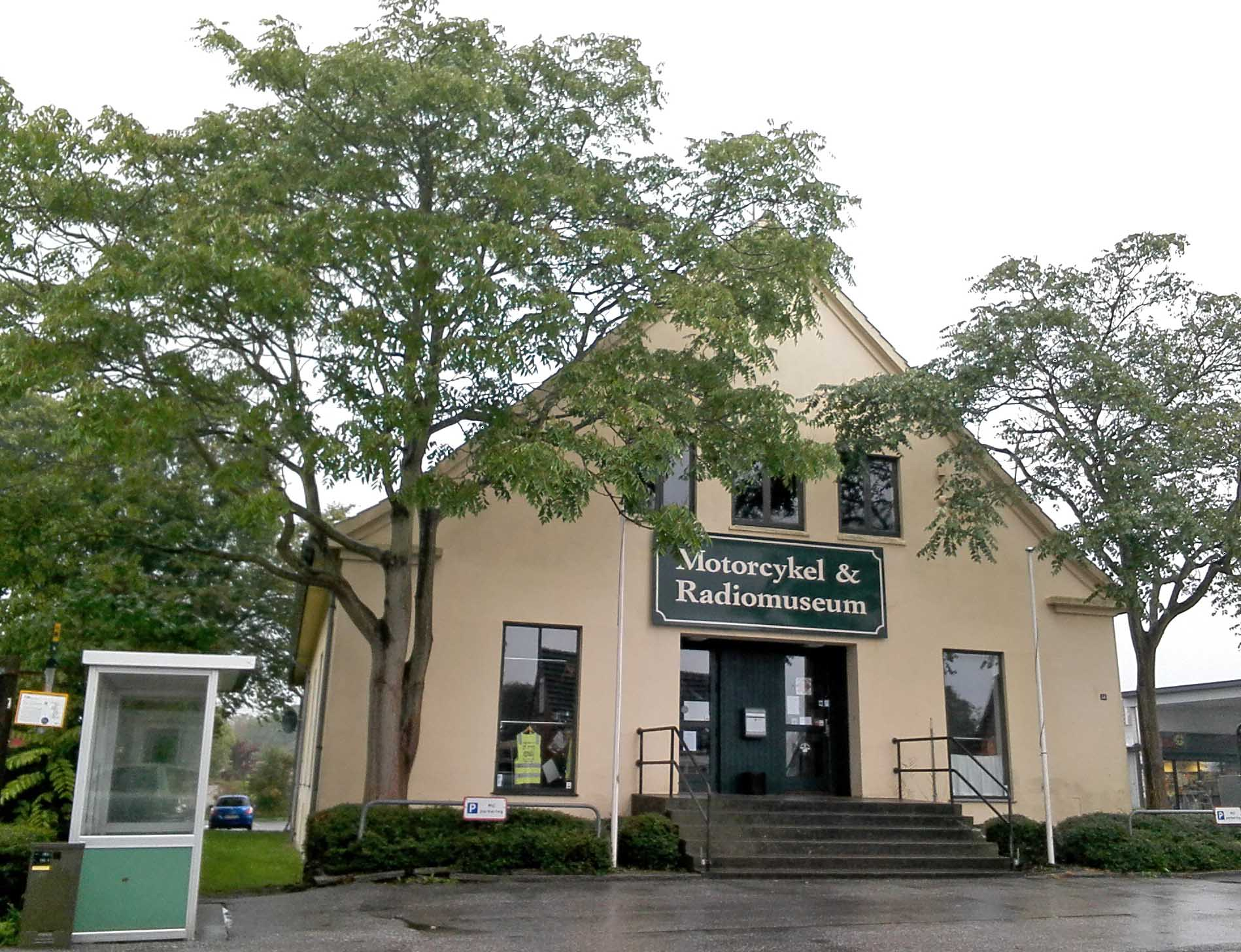 Motorcykel- og radiomuseet i Stubbekøbing